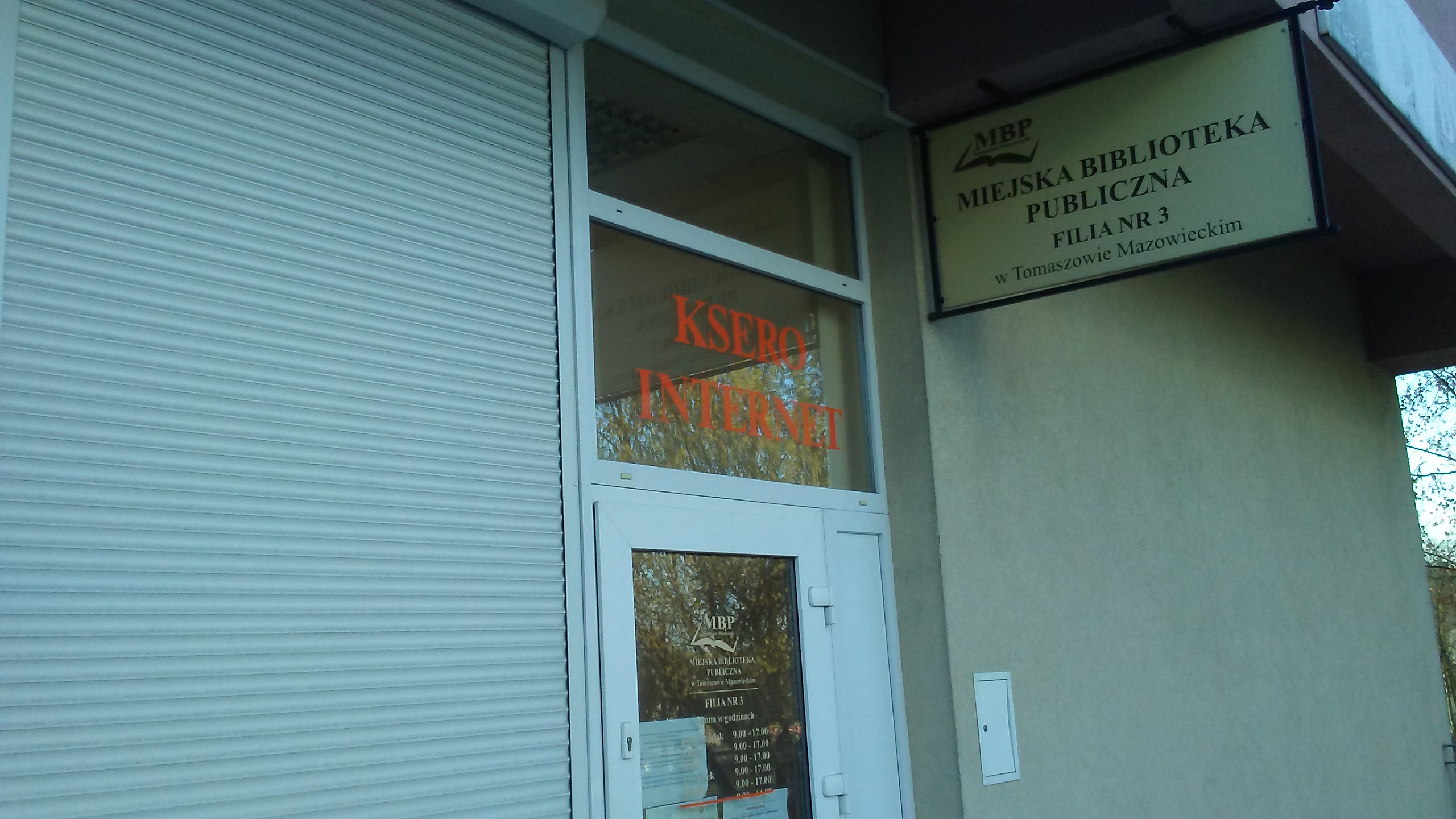 Biblioteka publiczna na Niebrowie w Tomaszowie Mazowieckim, ulica Stanisława Koplina 1